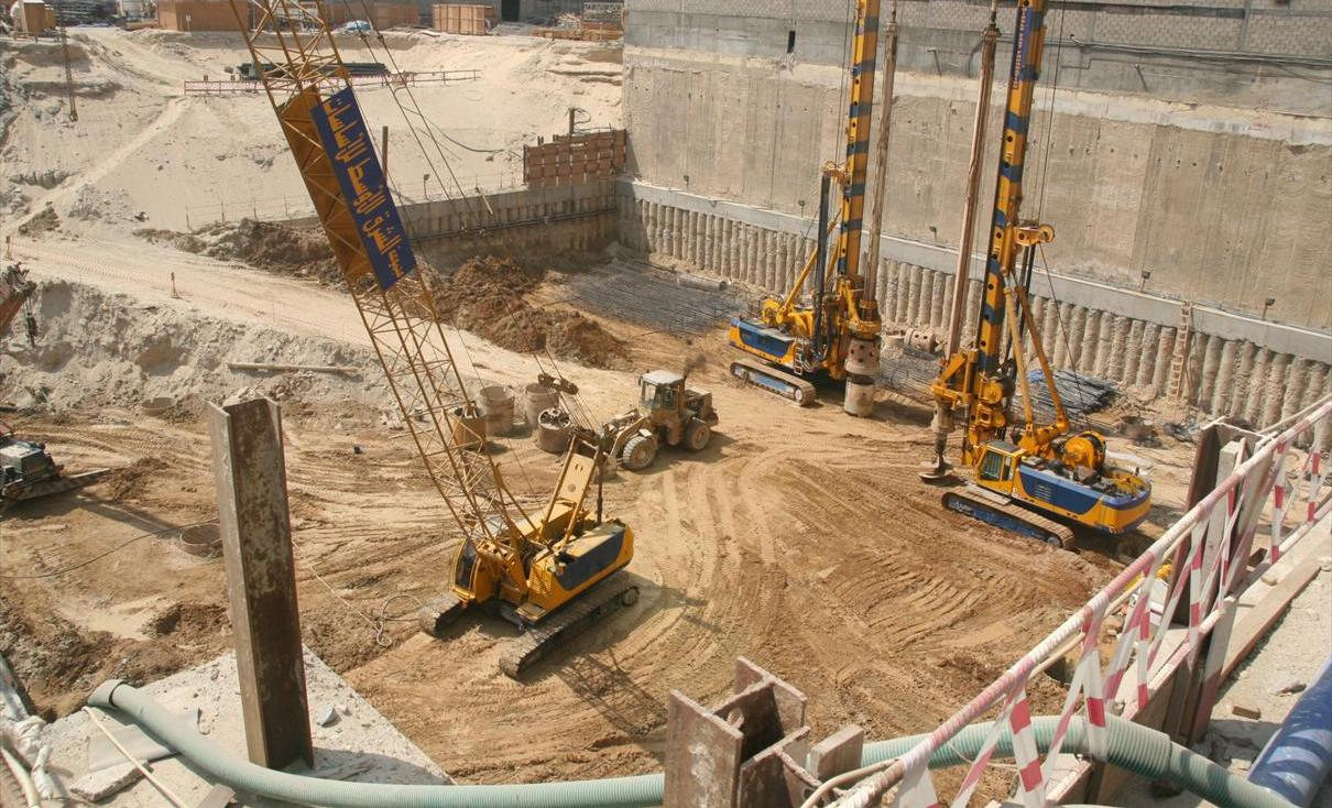 Foto de el edificio en construcción Marina 101 en Dubai